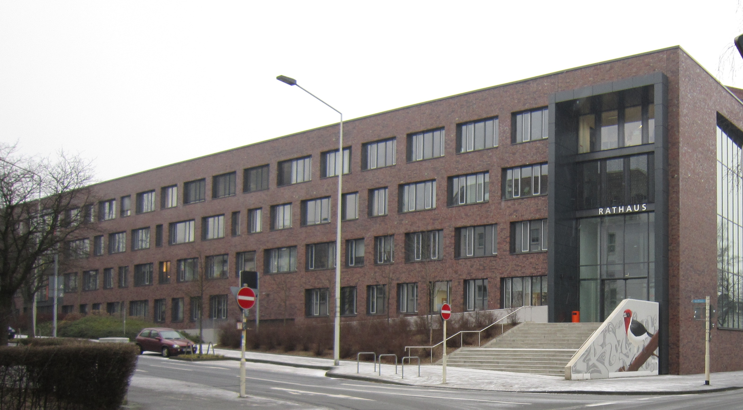 Rathaus Neubau mit Eingang Merianstraße, aufgenommen im Februar 2015